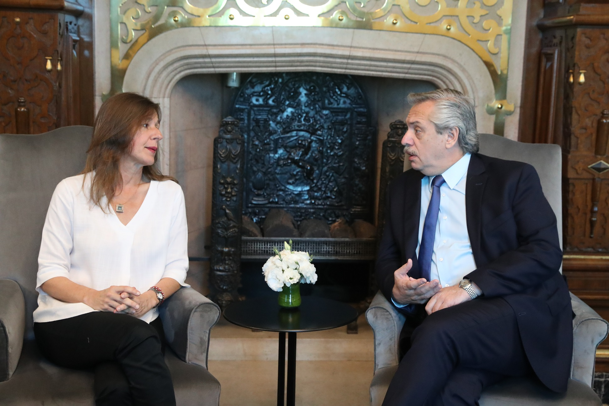 El presidente de la Nación, Alberto Fernández, designó a las nuevas autoridades de las fuerzas de seguridad. El anuncio fue realizado esta mañana en conferencia de prensa desde la Casa Rosada por el jefe de Gabinete, Santiago Cafiero, y la ministra de Seguridad, Sabina Frederic.